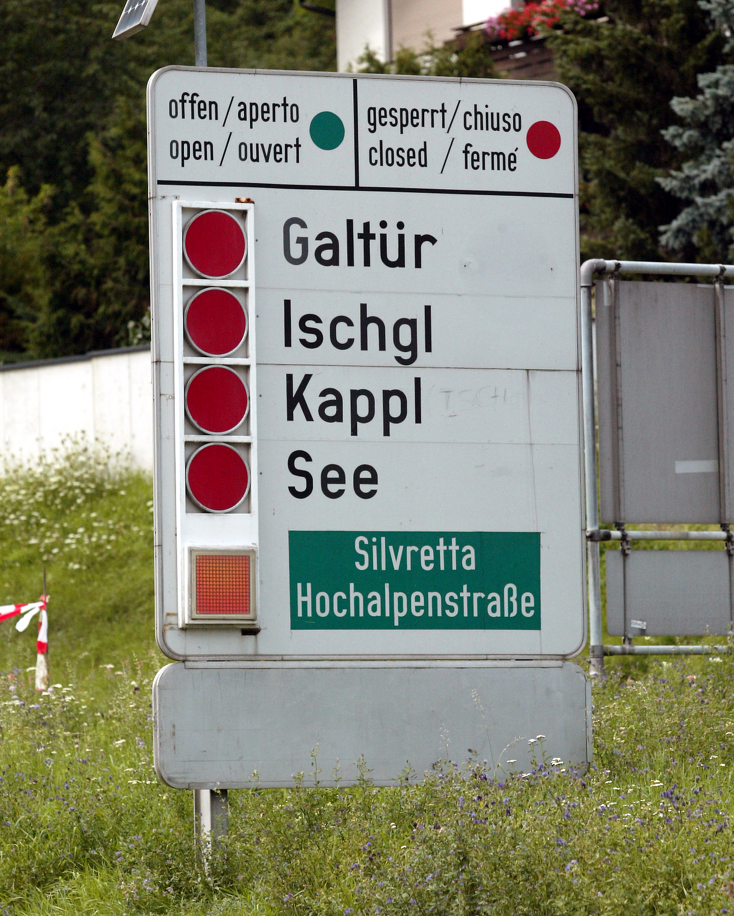 Sperre der Straße ins Paznaun aufgrund der Hochwasserkatastrophe